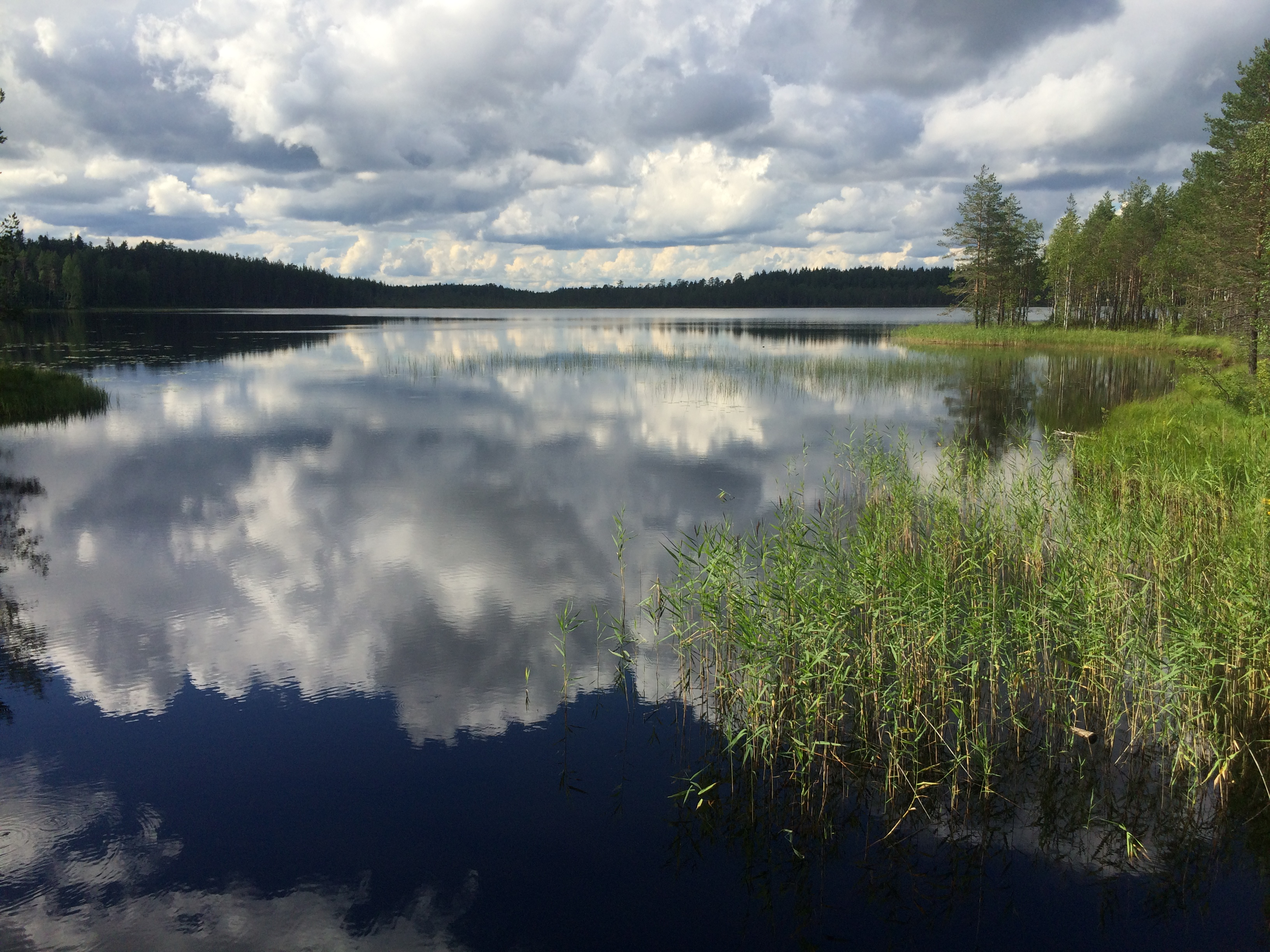 Судак (река, впадает в Сямозеро)